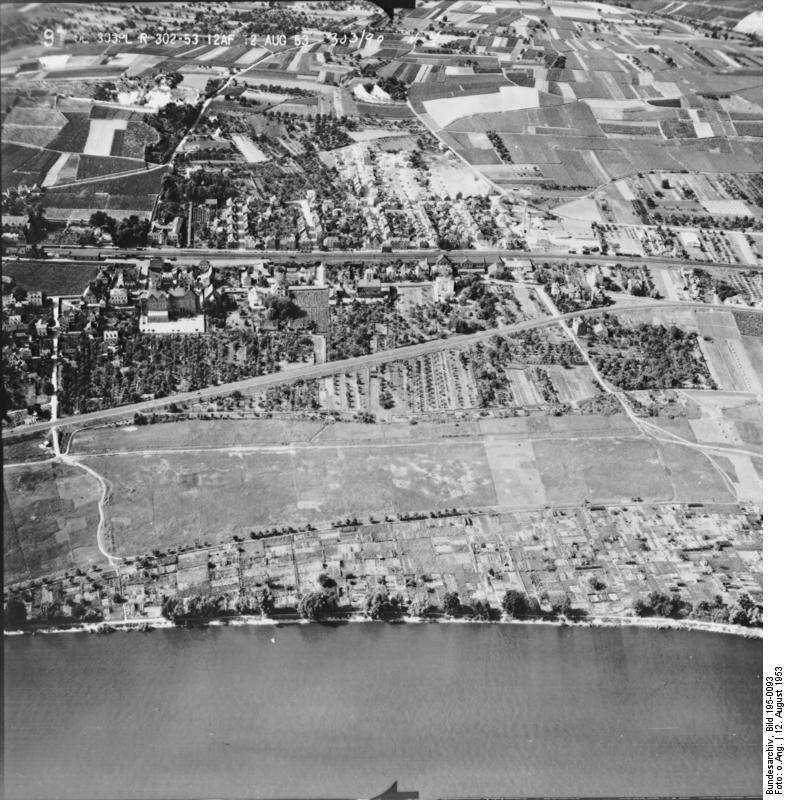 Rheinbefliegung der Alliierten 1953